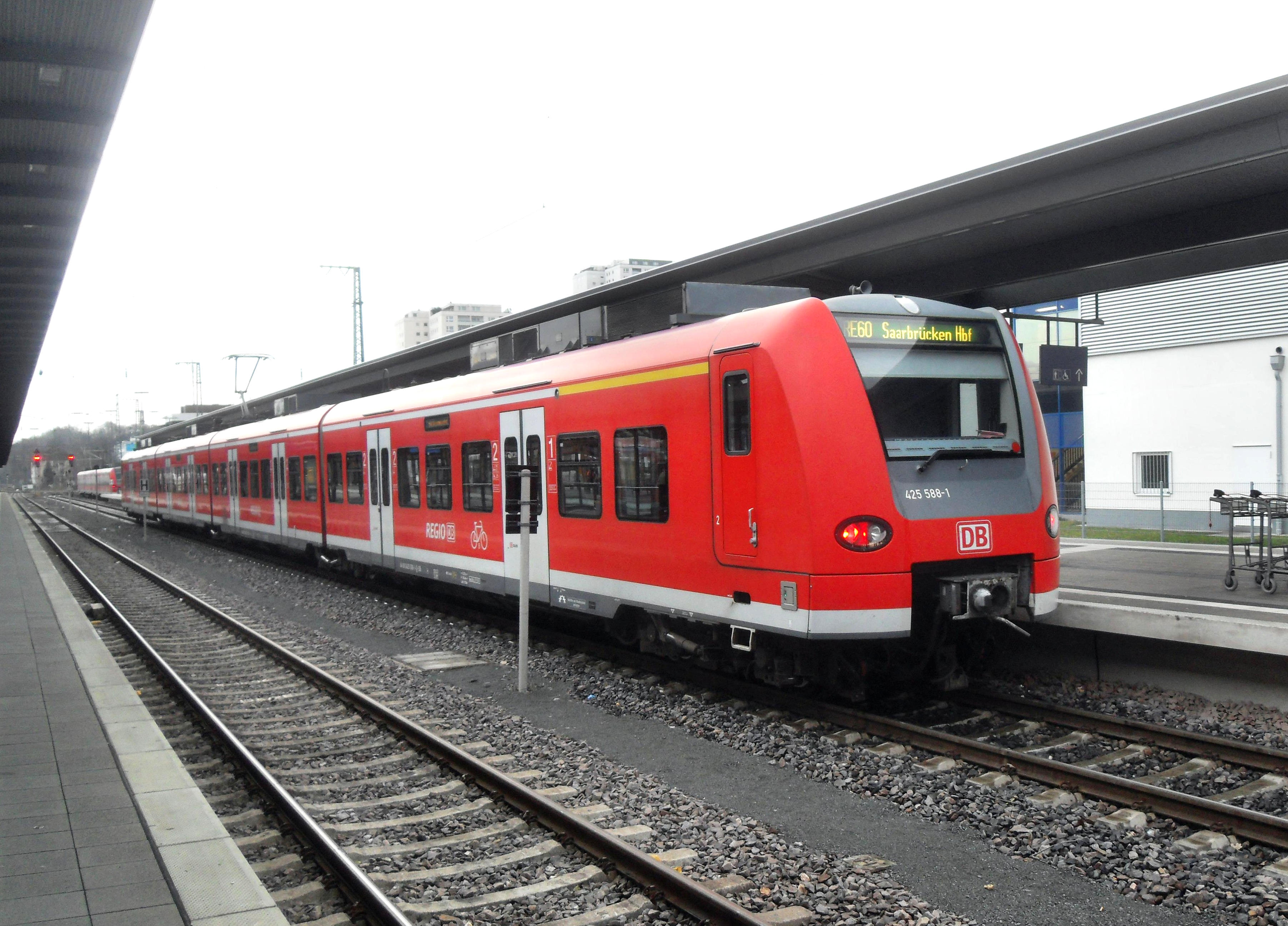 RegionalExpress der Baureihe 425 im Kaiserslauterner Hauptbahnhof auf dem Weg nach Saarbrücken über die Pfälzische Ludwigsbahn